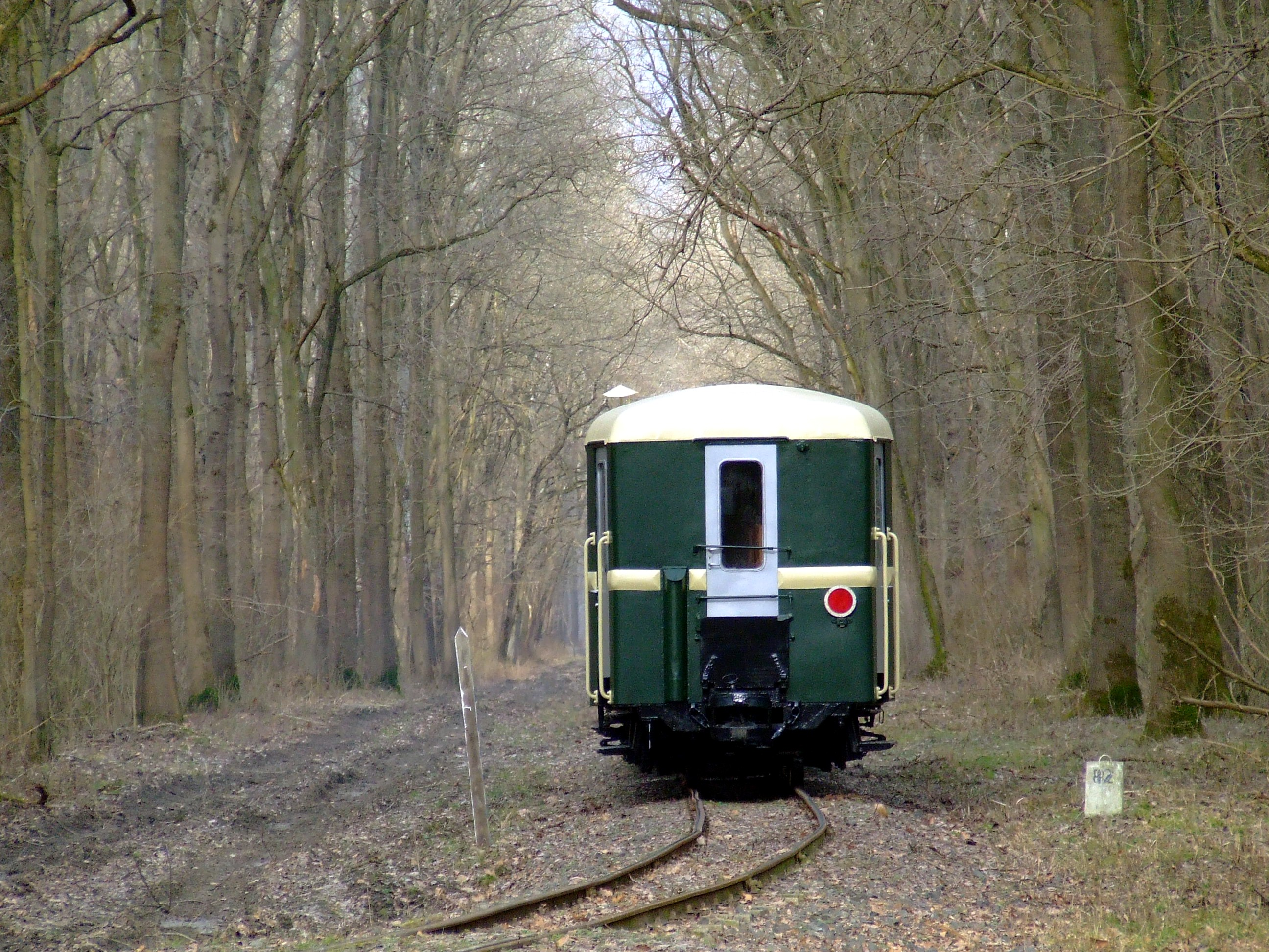 Duna-Dráva nemzeti Park, Gemenci Állami Erdei Vasút